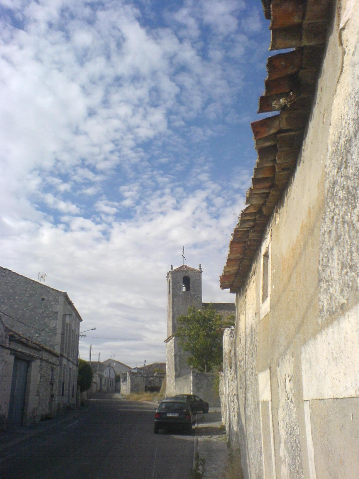 Iglesia de la localidad de Moraleja de Cuéllar, provincia de Segovia, Castilla y León, España.